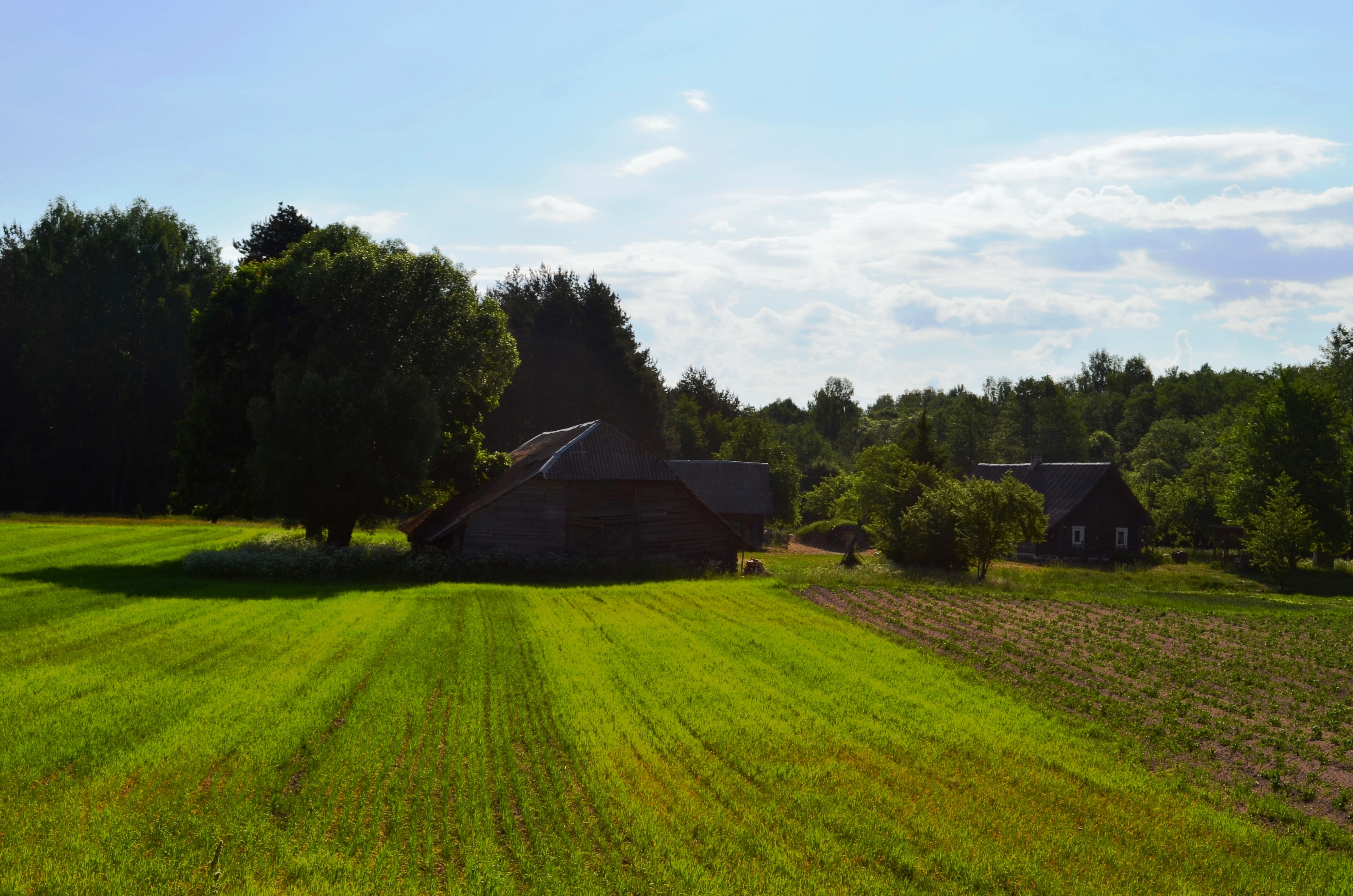 Stakinės, Vilniaus raj.